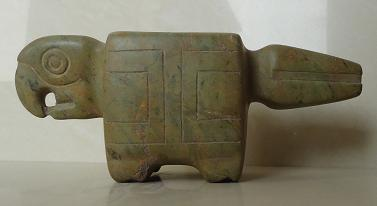 Mortero, Valdivia Costa Sur // 4000 a.C. - 1500 a.C.